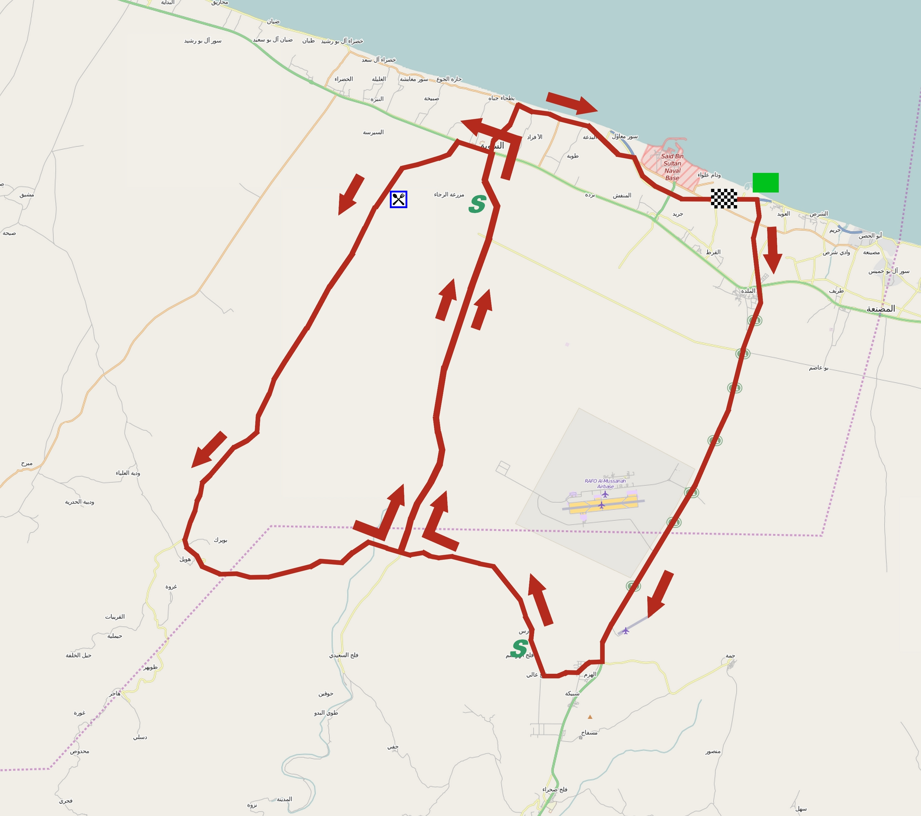 Parcours de la troisième étape du Tour d'Oman 2015. This map may be incomplete, and may contain errors. Don't rely solely on it for navigation.